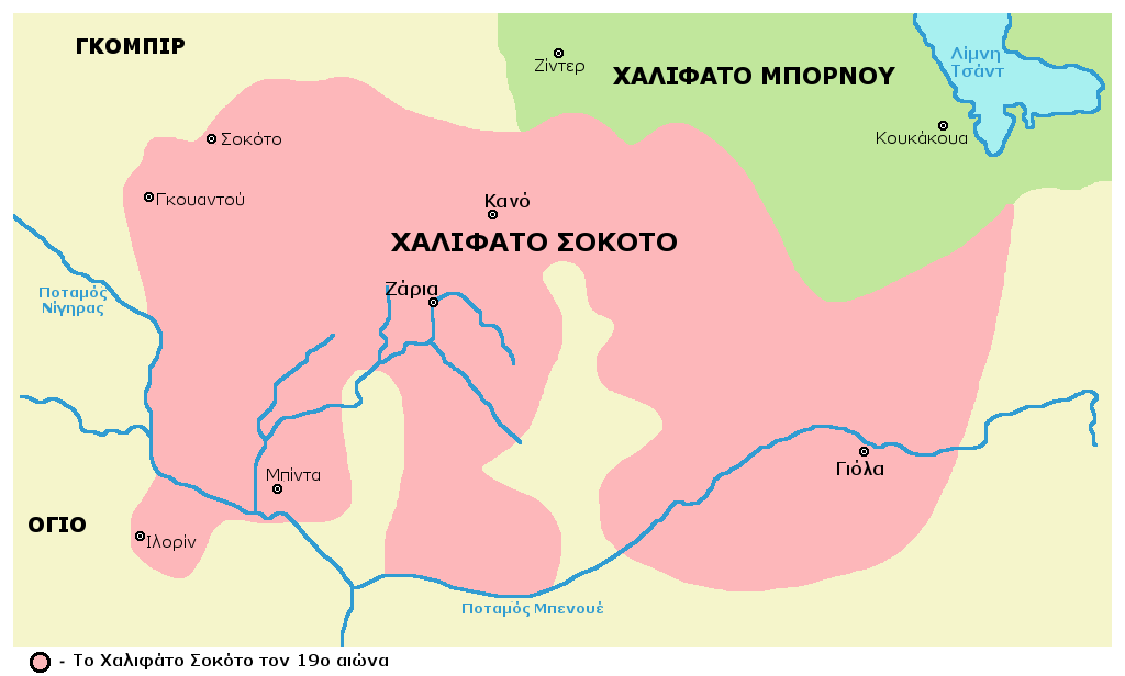 Χάρτης του Χαλιφάτου Σοκότο τον 19ο αιώνα